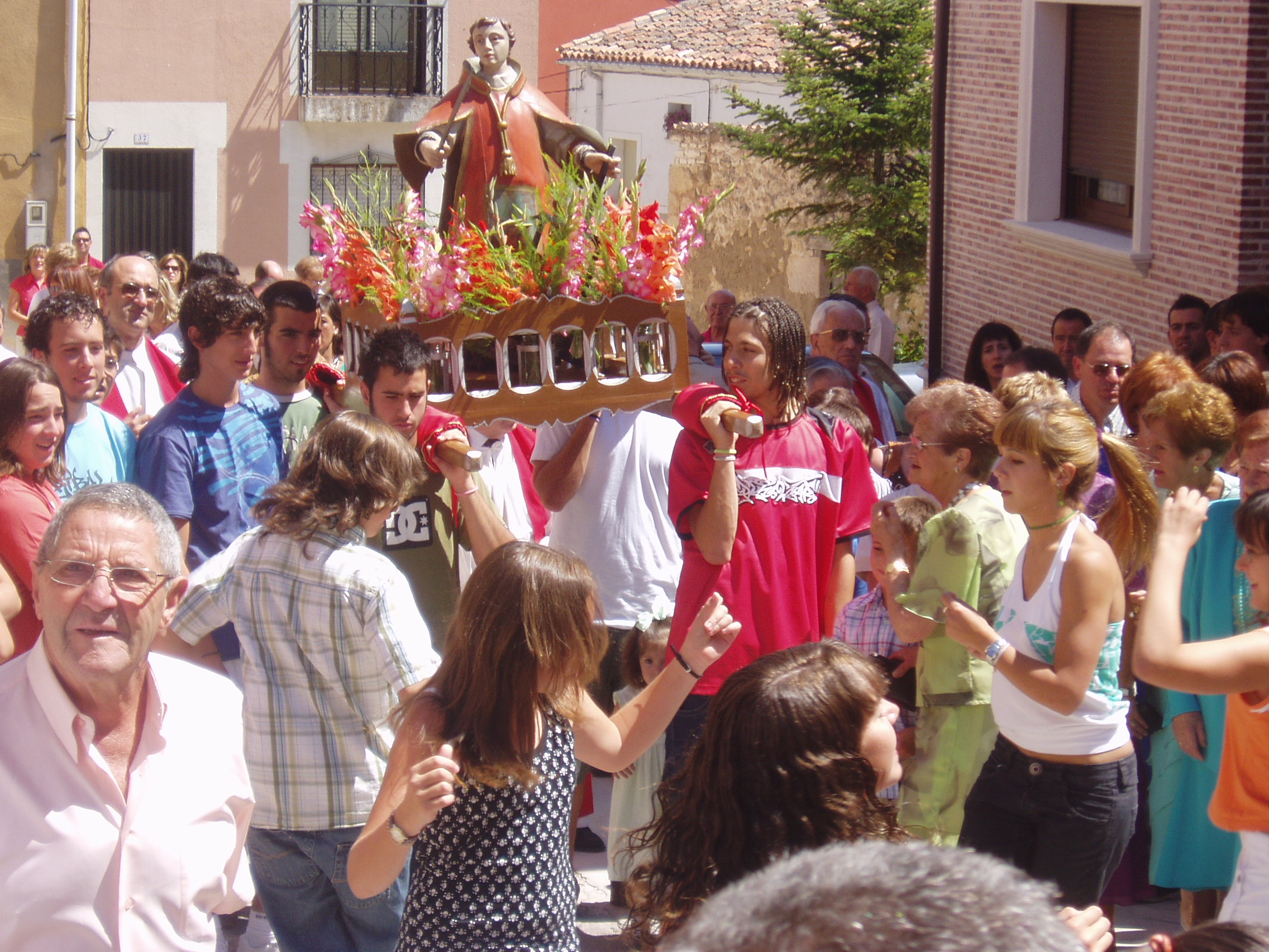 Fiestas de San Lorenzo en Villafruela 2007